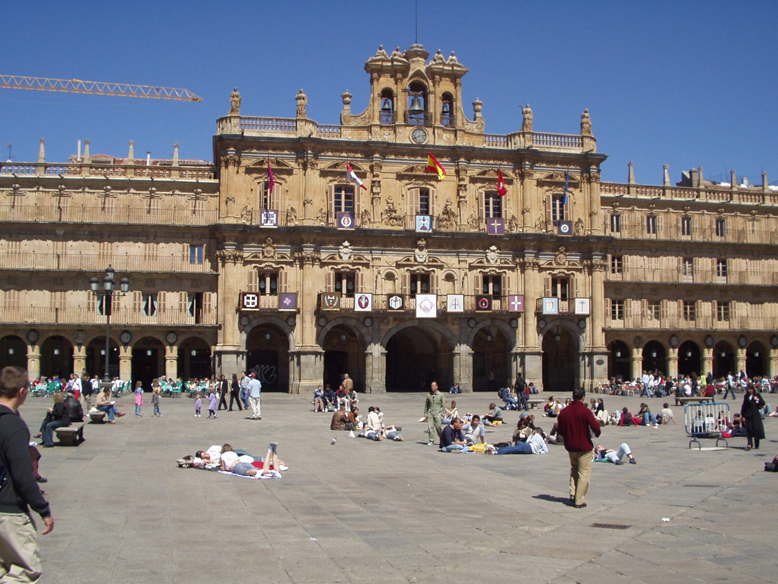 Plaza mayor de Salamanca, España. Main plazza of salamanca, Spain. Place principale de Salamanca, Espagne. Photo Julien Navarro